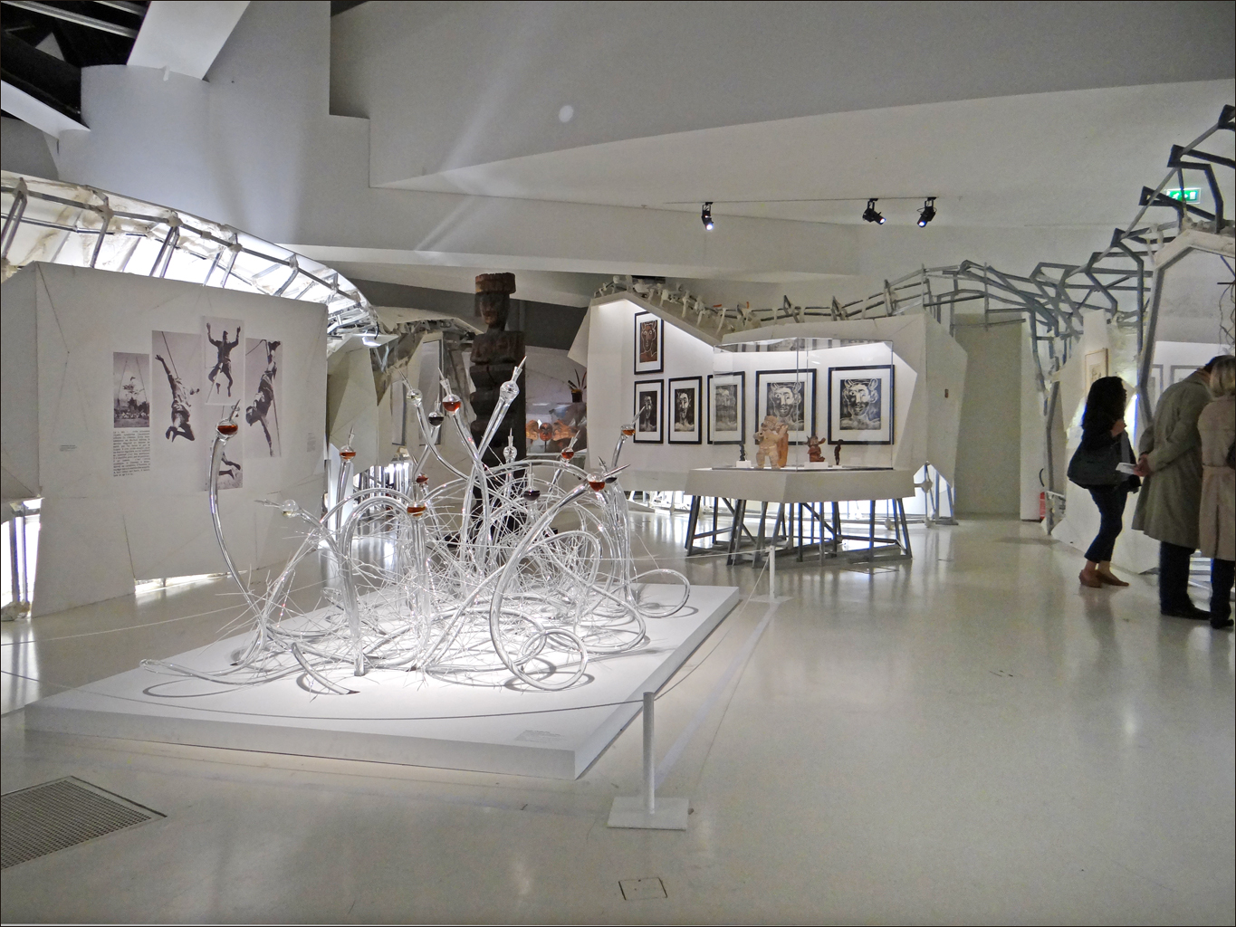 Salle de l'exposition consacrée aux voyages cosmiques et aux métamorphoses On peut voir sur la photo l'architecture scénographique de Jacob+MacFarlane qui, selon le dépliant distribué à l'entrée de l'exposition, a été faite pour accompagner l'évolution des sensations psychiques du visiteur pendant son parcours. Cet "objet poétique" participe d'après le commissaire de l'exposition à la signification générale de l'exposition. Exposition "les Maîtres du désordre" Musée du quai Branly